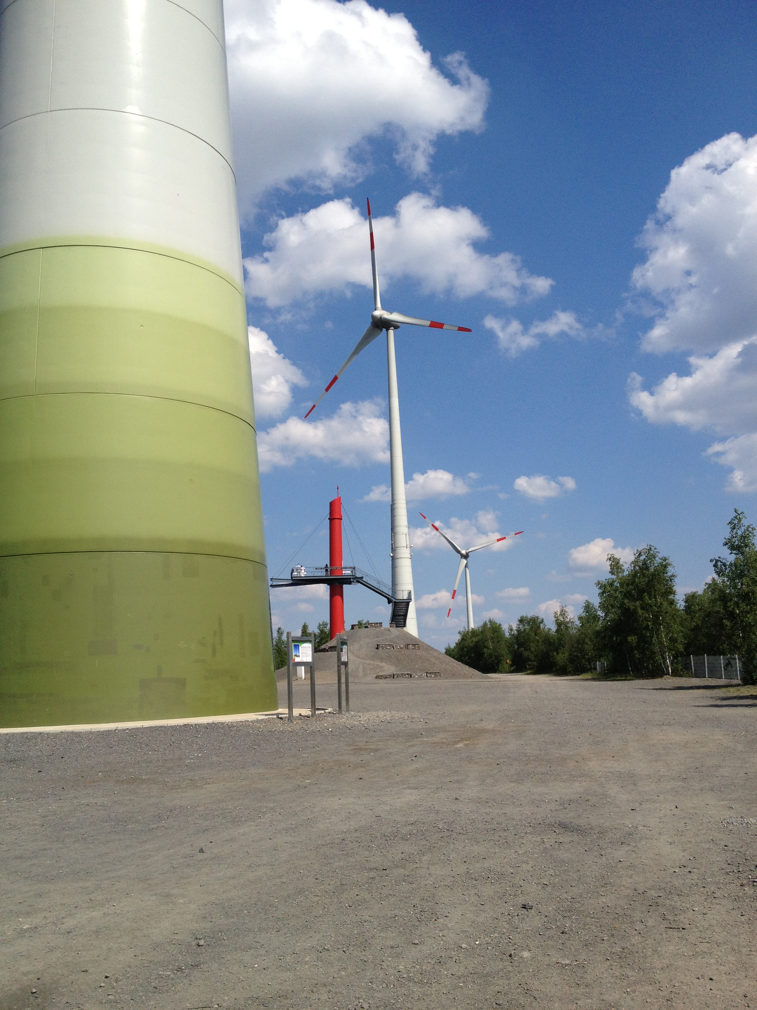 Neu gestaltetes Gipfelplateau des Piesbergs in Osnabrück, Mai 2012. Der rote Aussichtsturm war früher eine Windkraftanlage des Typs Enercon E-40/5.40, die im Sommer 2010 im Zuge des Repowerings demontiert wurde, und ermöglicht einen Rundblick über die Felsrippe über das Umland.